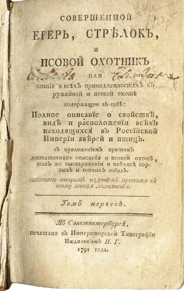 Титульный лист "Совершенного егеря" 2 изд